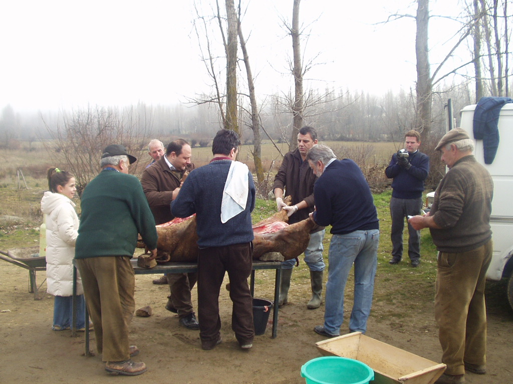 La tradicional matanza en Villafranca de la Sierra (Ávila, España). Autor: Hortensia (con permiso del autor)